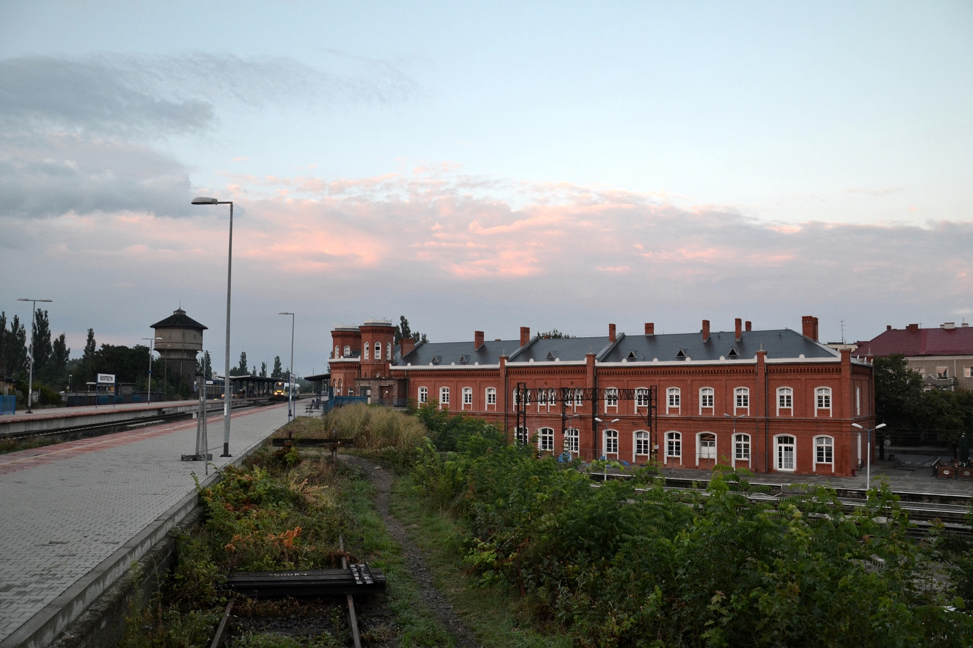 Górny poziom stacji Kostrzyn